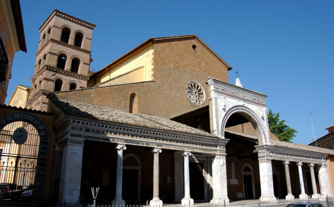 Duomo e torre campanaria, Civita Castellana.